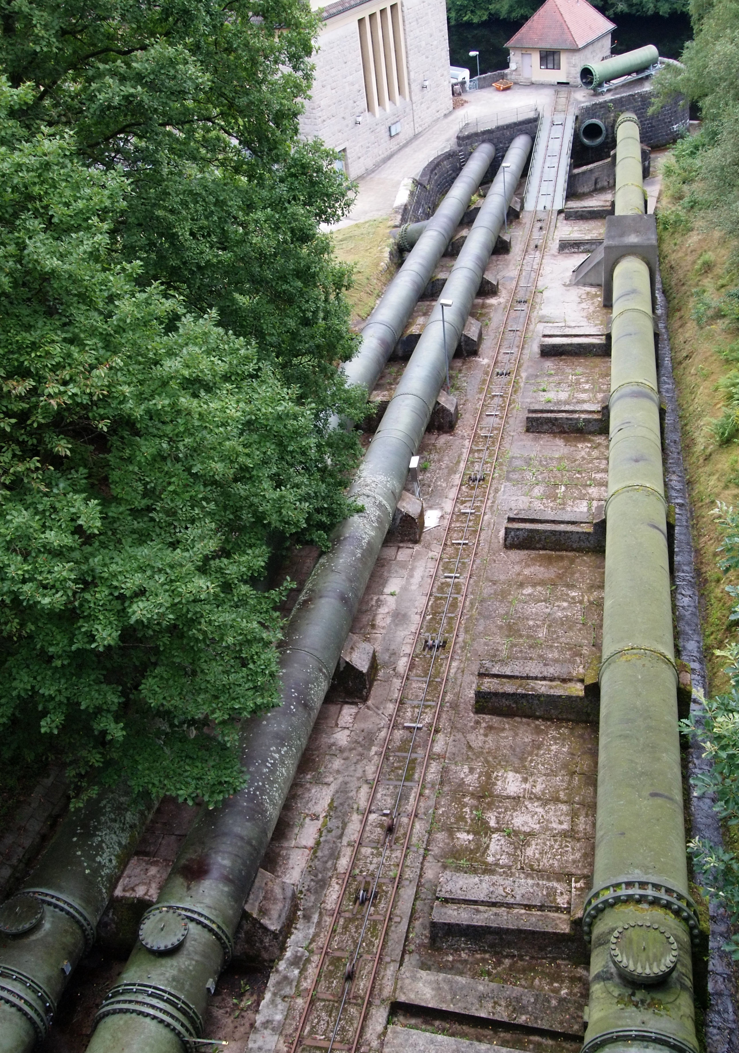 Druckrohre zum Rudolf-Fettweis-Werk. Die linken kommen von der Murgtalsperre, das rechte von der Schwarzenbachtalsperre